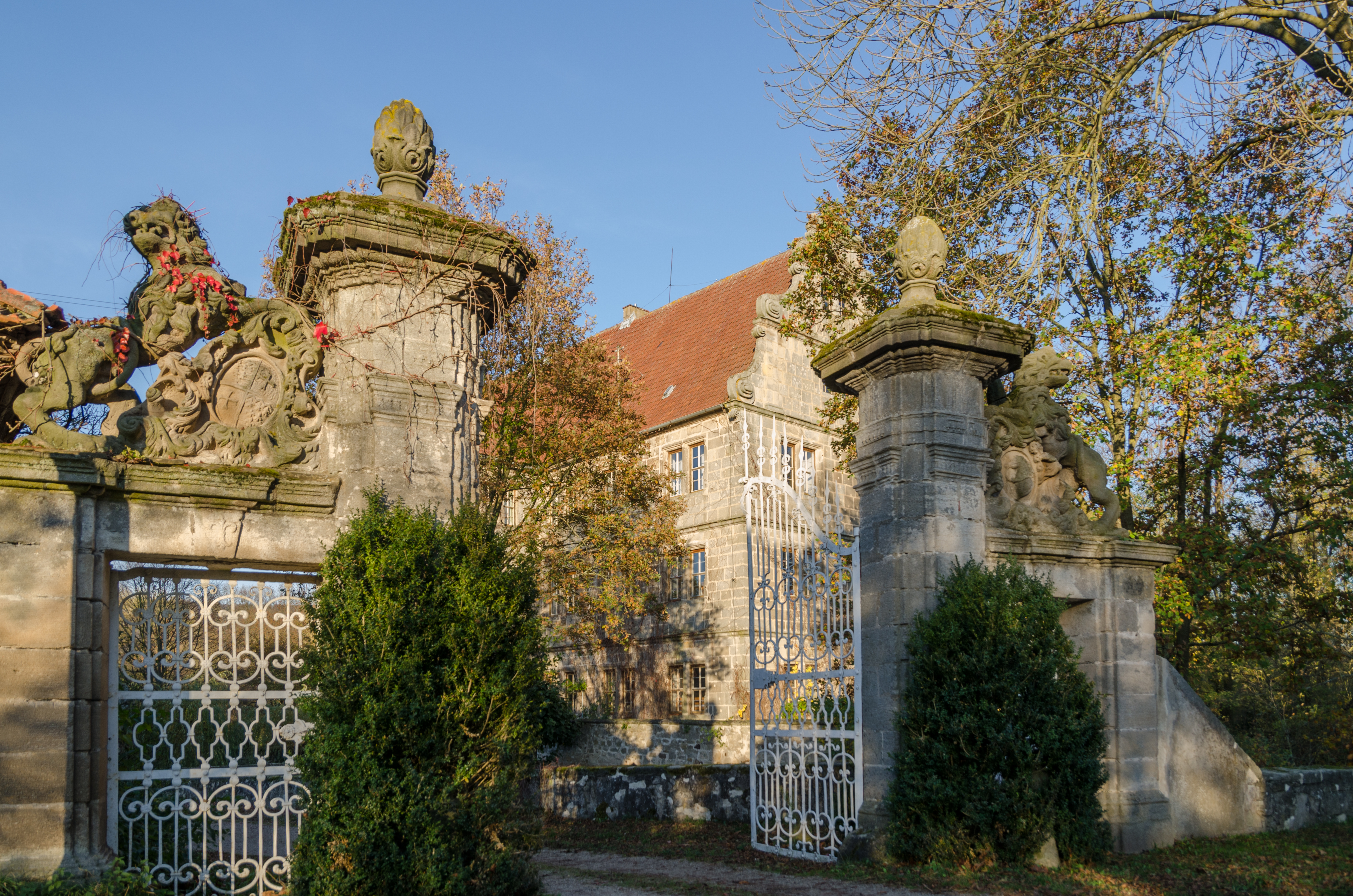 Friesenhausen, Schloß